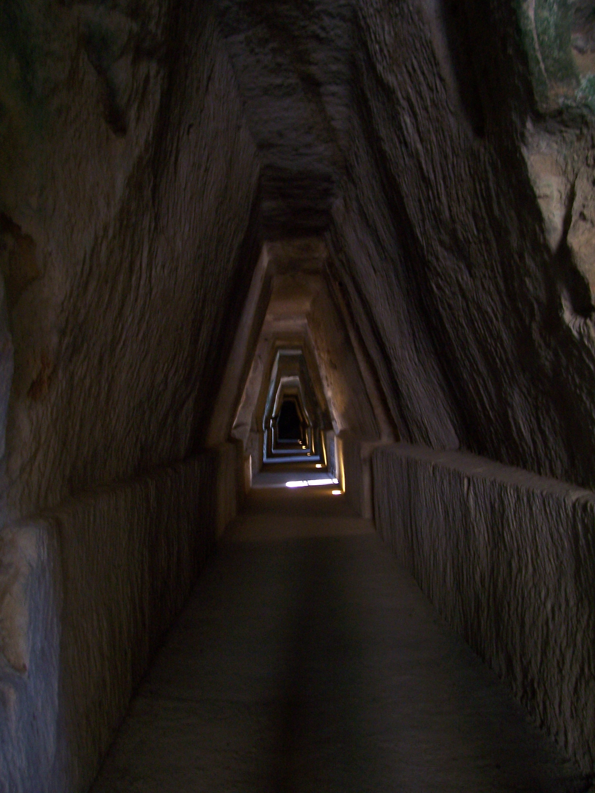 Sibyllengrotte von Cumae